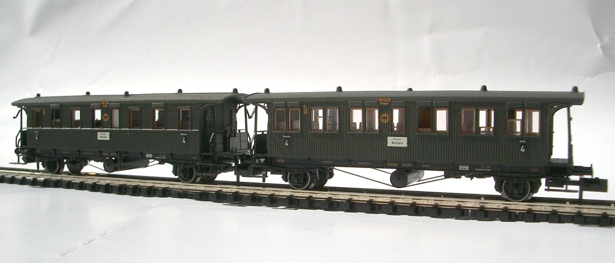 Modelle der württembergischen Personenzugwagen der Bauarten Di wü 98a und Di wü 08 der Firma Brawa